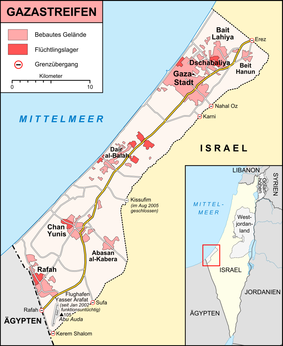 Karte des Gazastreifens, Stand Dezember 2008